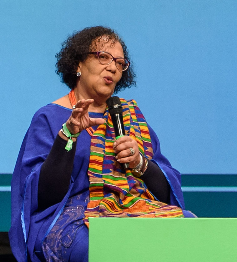 02.05.2018, Berlin: Talk: Perspectives from developing countries - It's the End of the work as we know it (and I feel fine)! Speaker: Mark Graham, Amel Saidane, Dorothy Gordon, Richard David Precht, Katharina Hochfeld. Die re:publica ist eine der weltweit wichtigsten Konferenzen zu den Themen der digitalen Gesellschaft und findet in diesem Jahr vom 02. bis 04. Mai in der STATION-Berlin statt. Foto: Gregor Fischer/re:publica